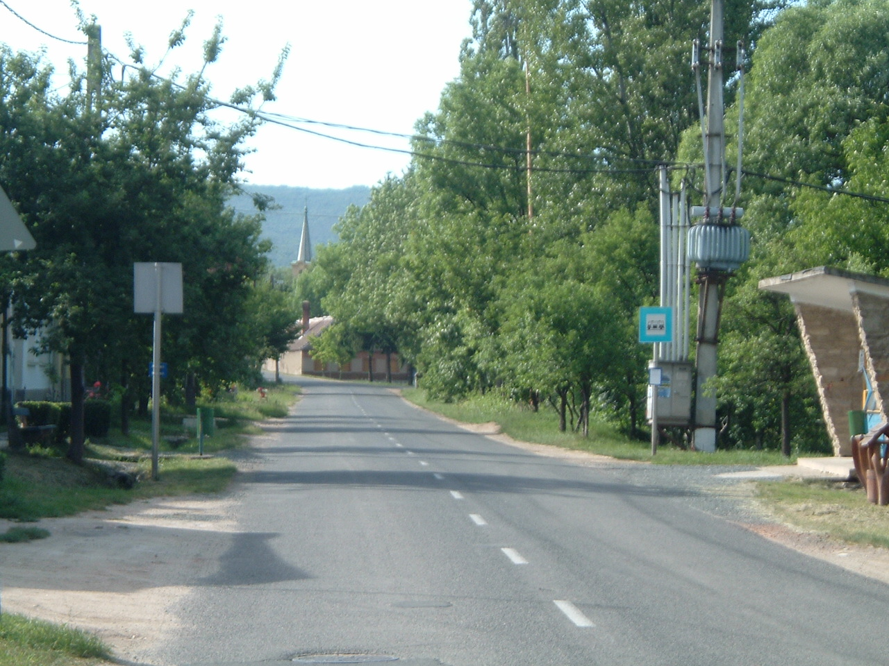 Kőszegdoroszló, Hungary